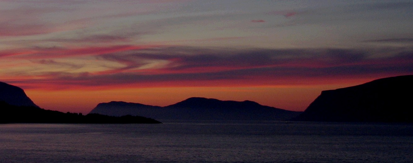 Vartdalsfjoden met Storfjorden at Hjørundneset, Møre og Romsdal, Norway